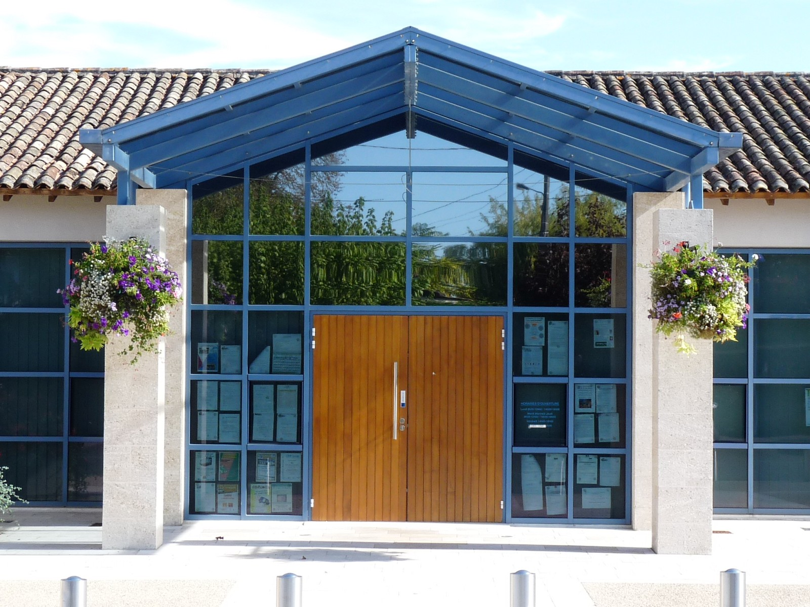 Mairie de Cubnezais, Gironde, France